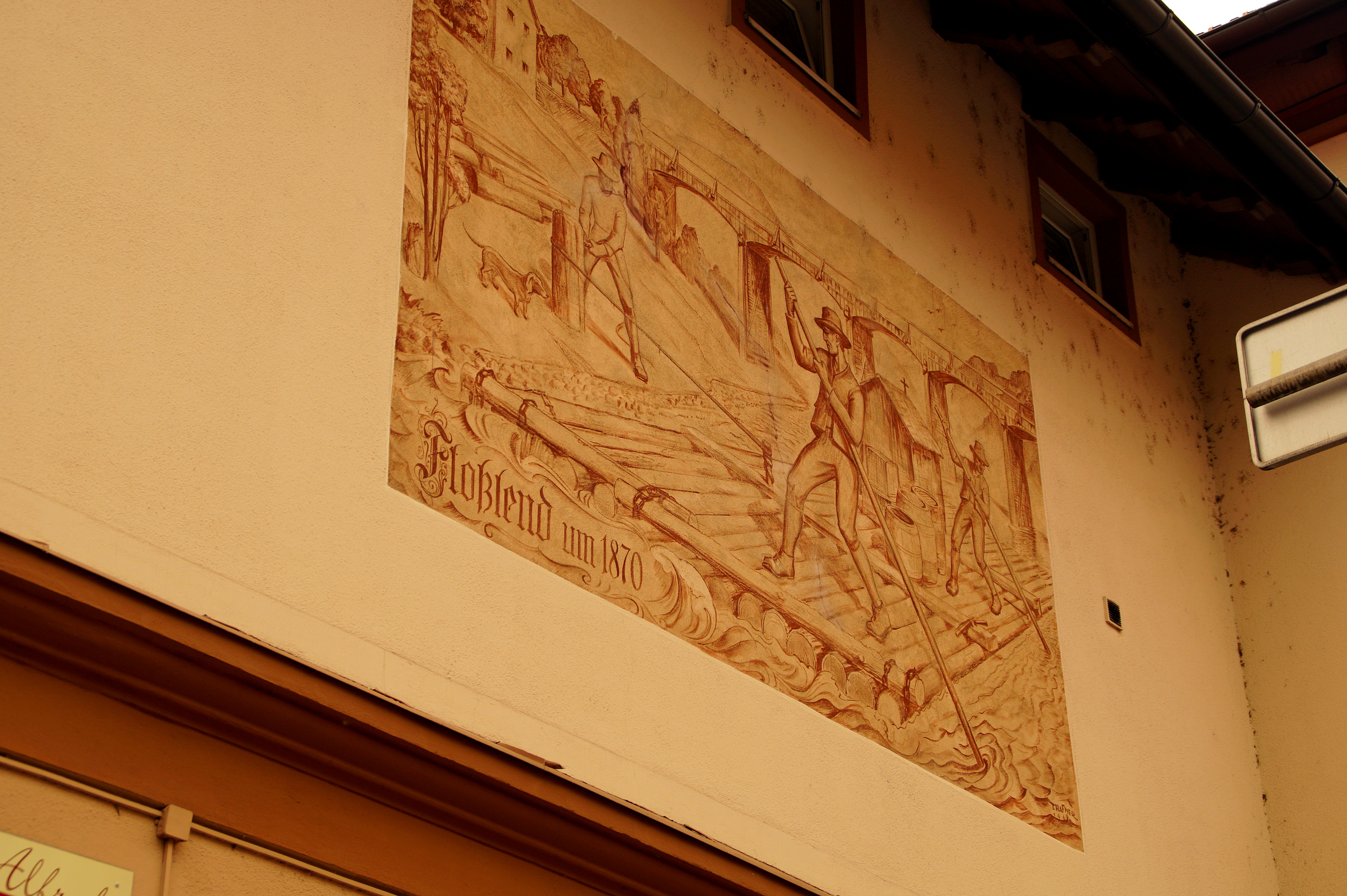 Kalvarienbrücke über die Mur in Graz Lend/Geidorf, Erinnerungstafel an die frühere Floßlende